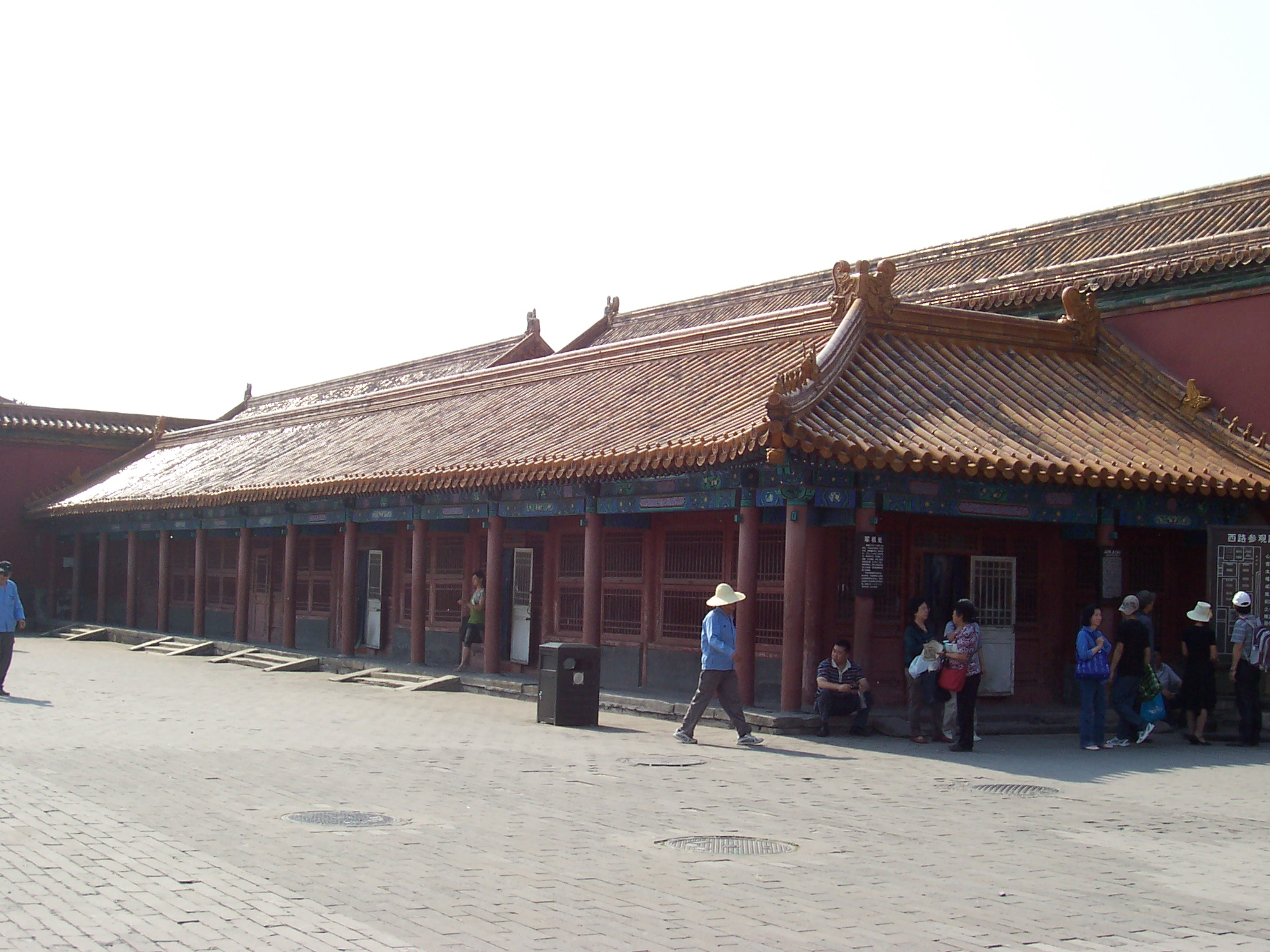 北京故宫军机处